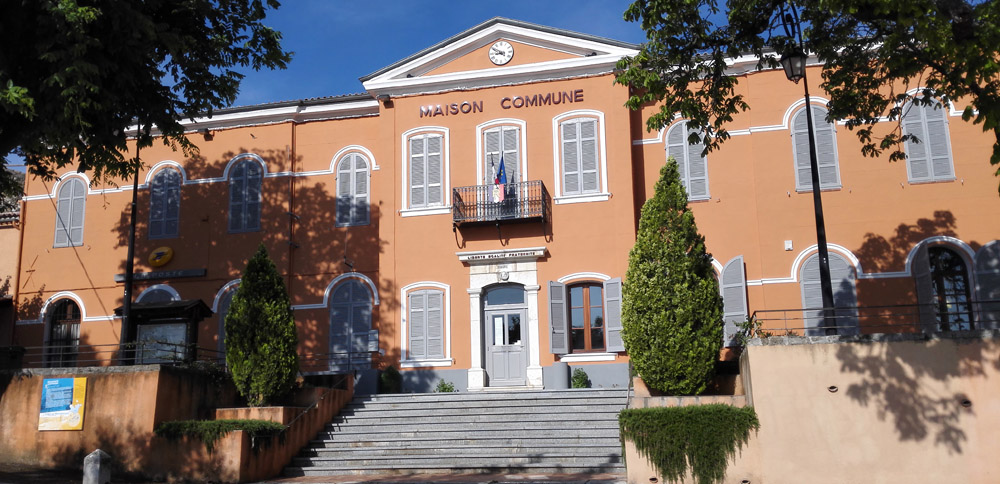 Mairie de Montmeyan, Var, France